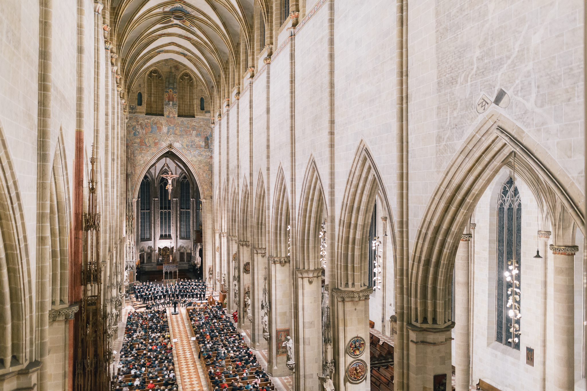 November 2016